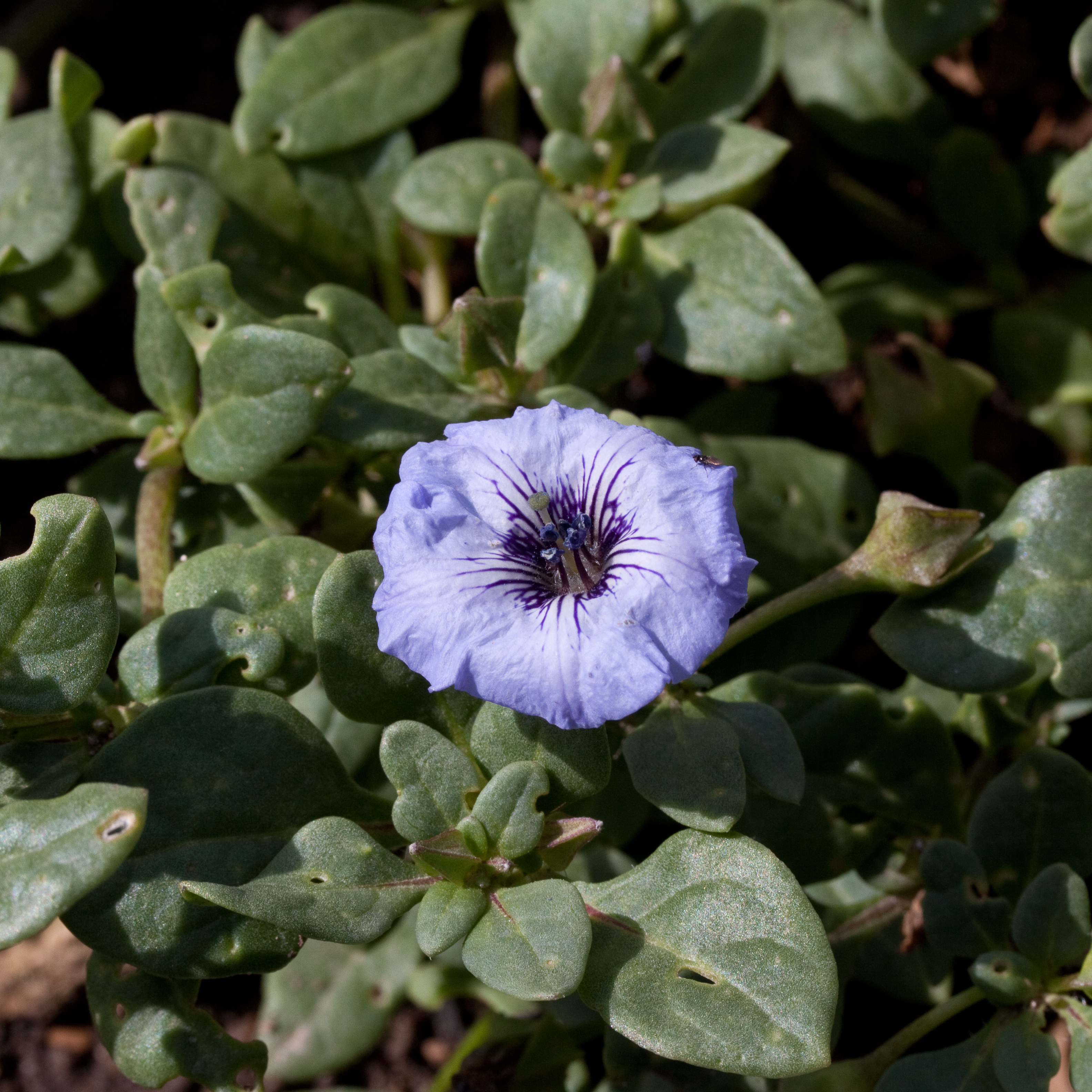 Fleur de Nolana humifusa - Jardin des Plantes - Paris - France